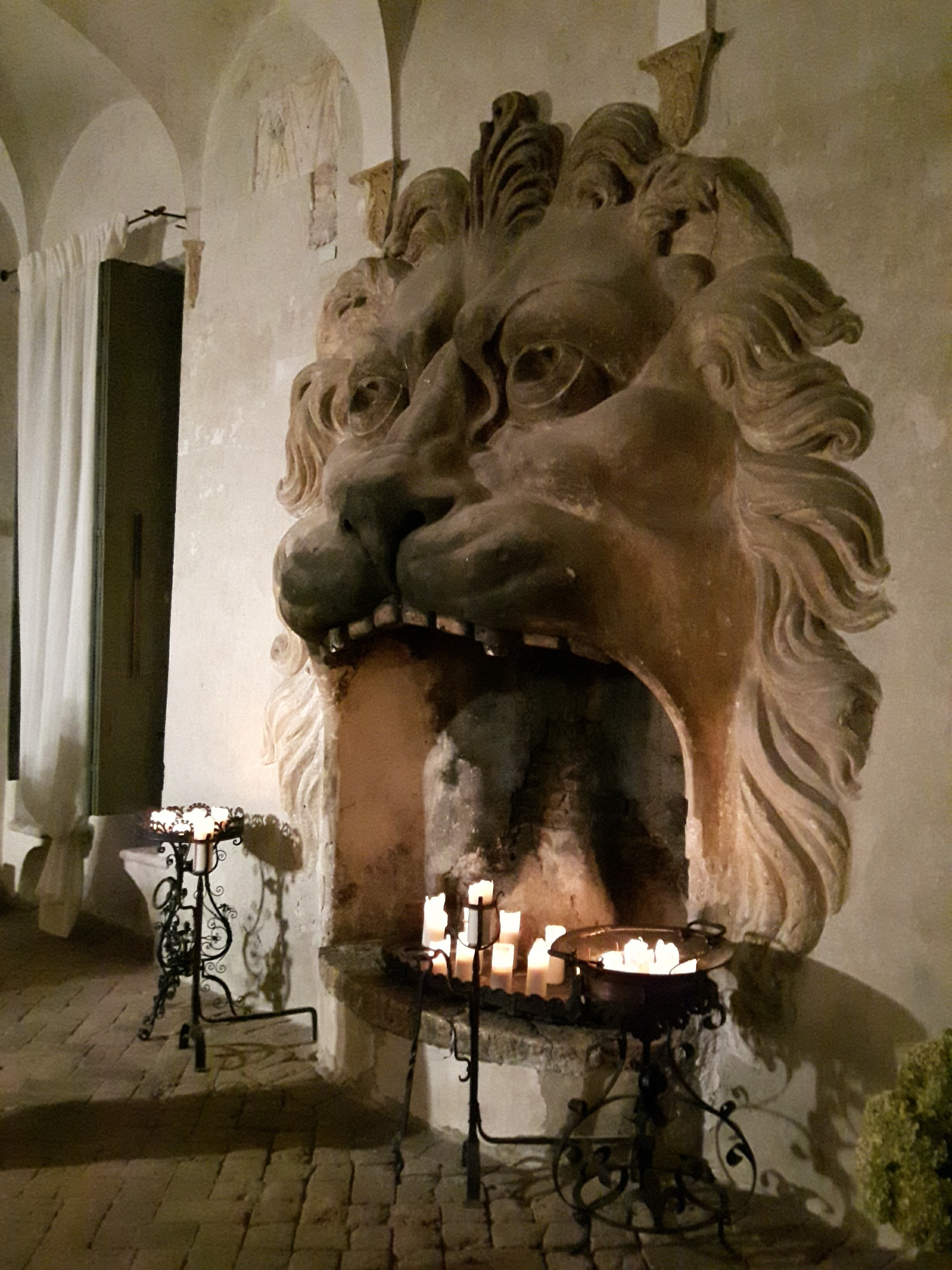 CAMINO DEL LEONE. I Mascheroni (diavolo, angelo, pesce o mostro marino, leone ) che ornano le stanze della villa veneta sono ironici stupendi camini: animati da uno spirito grottesco, immortalano originali sembianze animalesche.